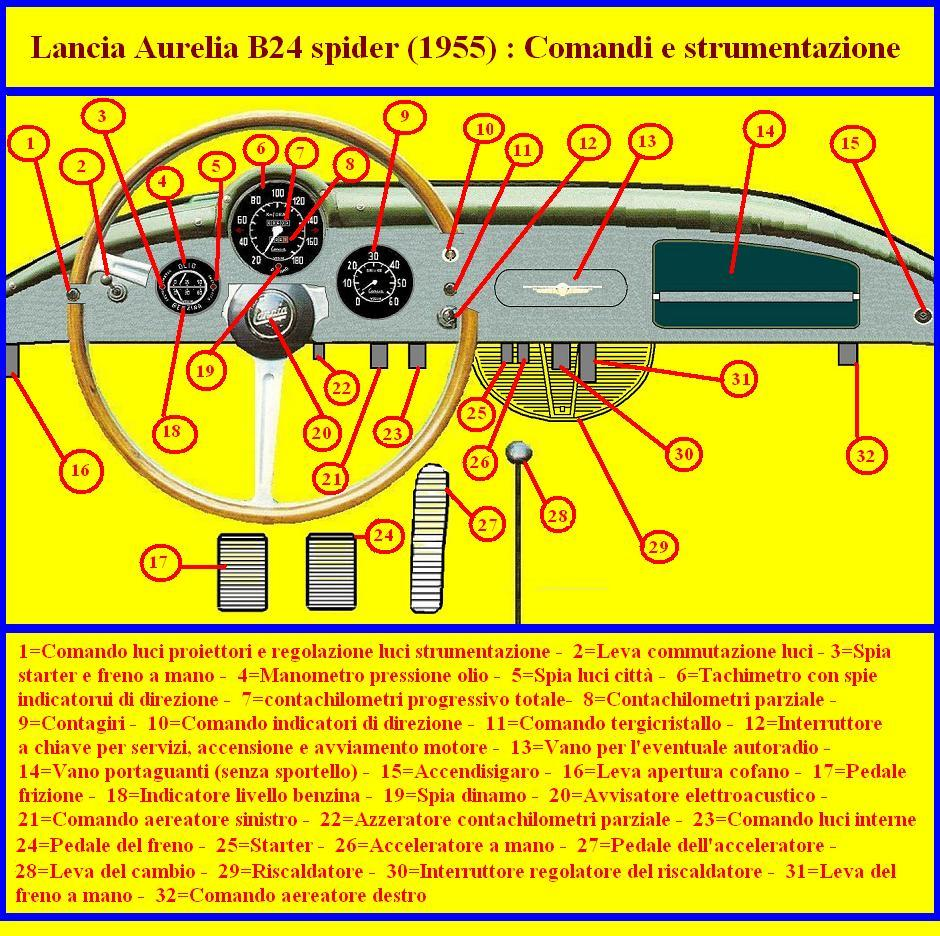 Disegno eseguito dal sottoscritto (Giomayo) utilizzando il programma "Paint" di Windows e traendo ispirazione per i particolari da una serie di immagini su riviste diverse, tra le quali il numero 2 (febbraio 1987) della rivista "GT Granturismo e Competizione", Motor Italia numero 27/1954 e il libro "Aurelia GT" edito nel 1983 da Edizioni della Libreria dell'automobile